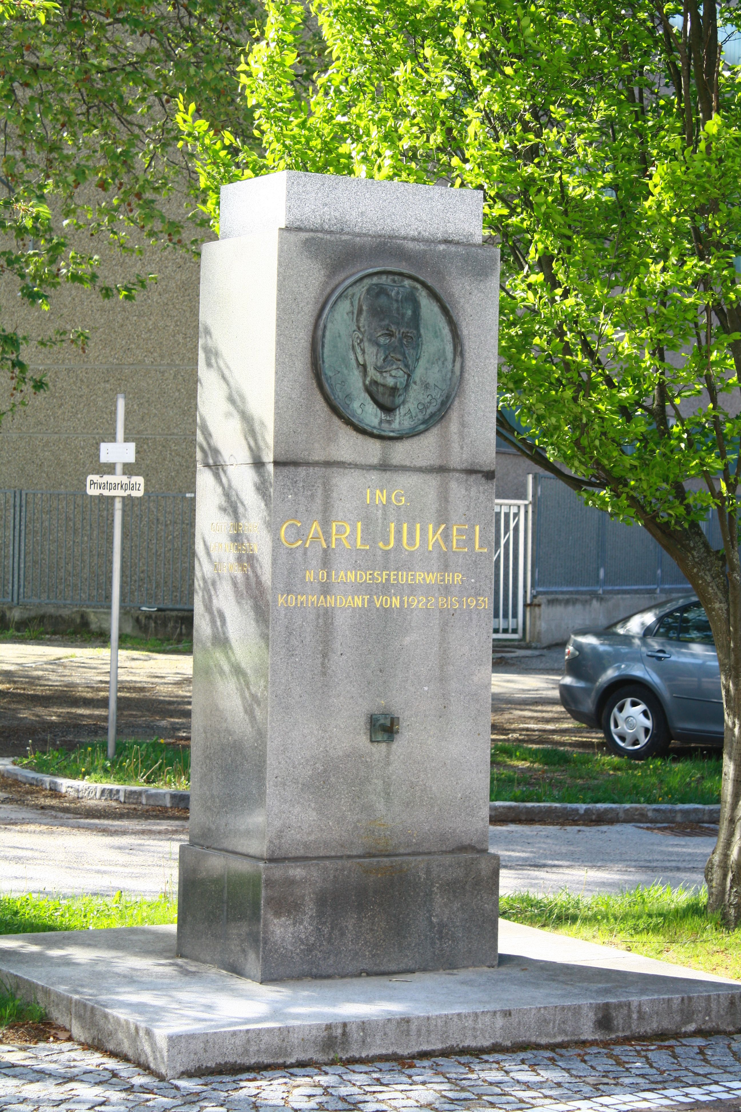 Monument of Karl Jukel in Schönau an der Triesting in Niederösterreich